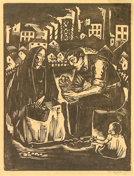 Posiłek